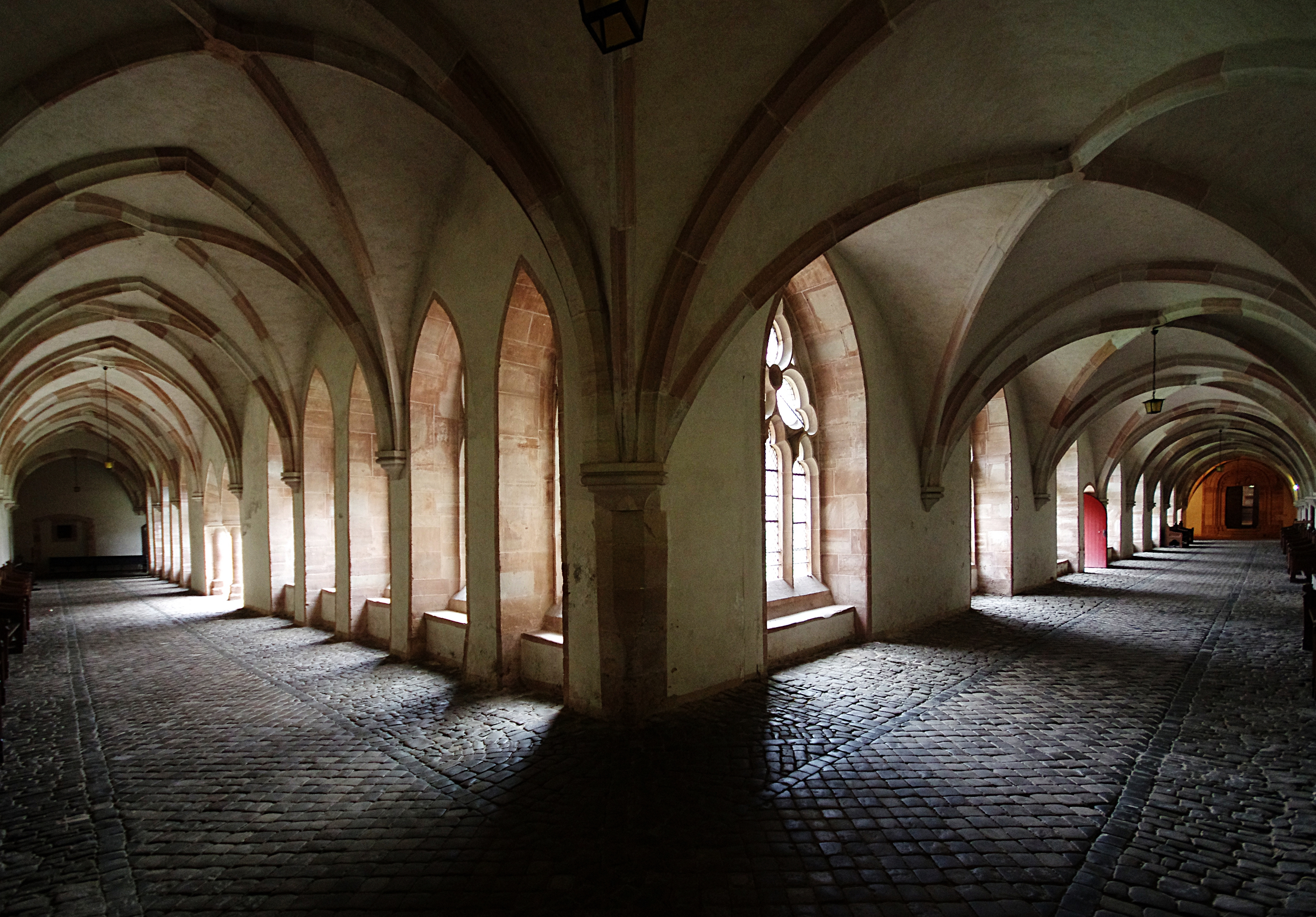 Haina (Kloster) in Hessen. Das Kloster Haina mit dem Kreuzgang.